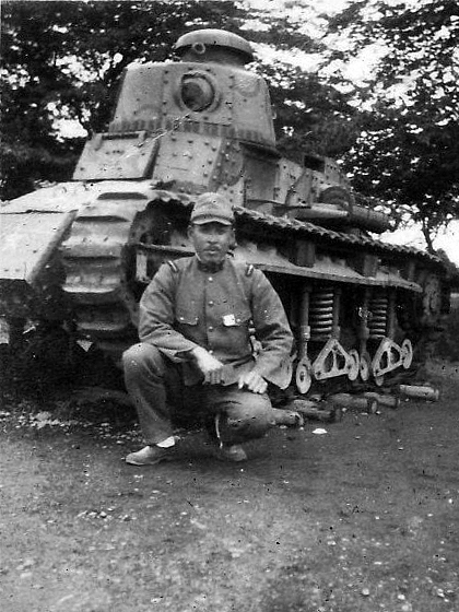 上海事変に派遣され、戦闘後武装を外され展示されるルノー乙型戦車と、その前で記念撮影をする日本兵